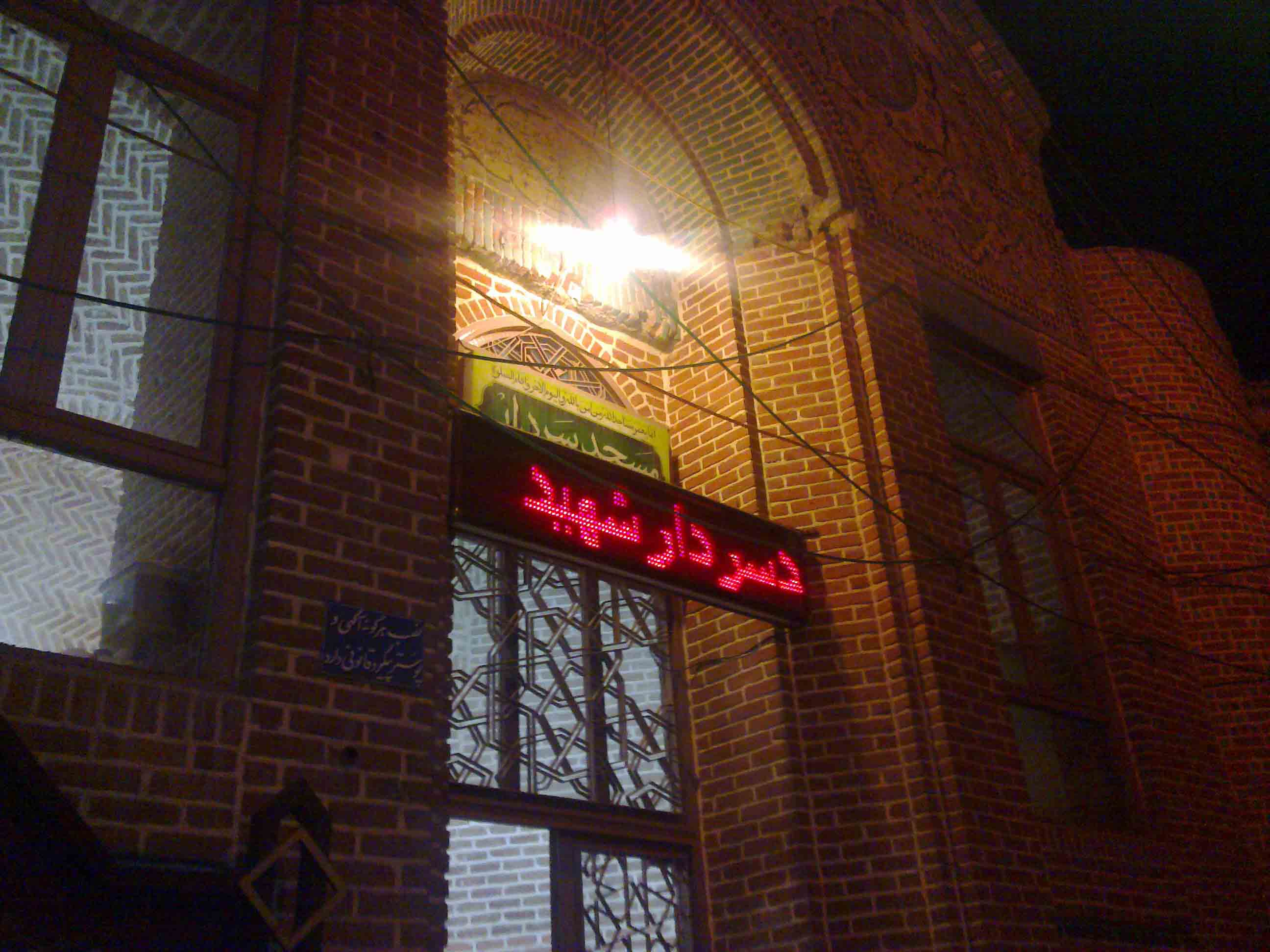 ورودی مسجد سردار اورمیه مزیین به نام سردار شهید